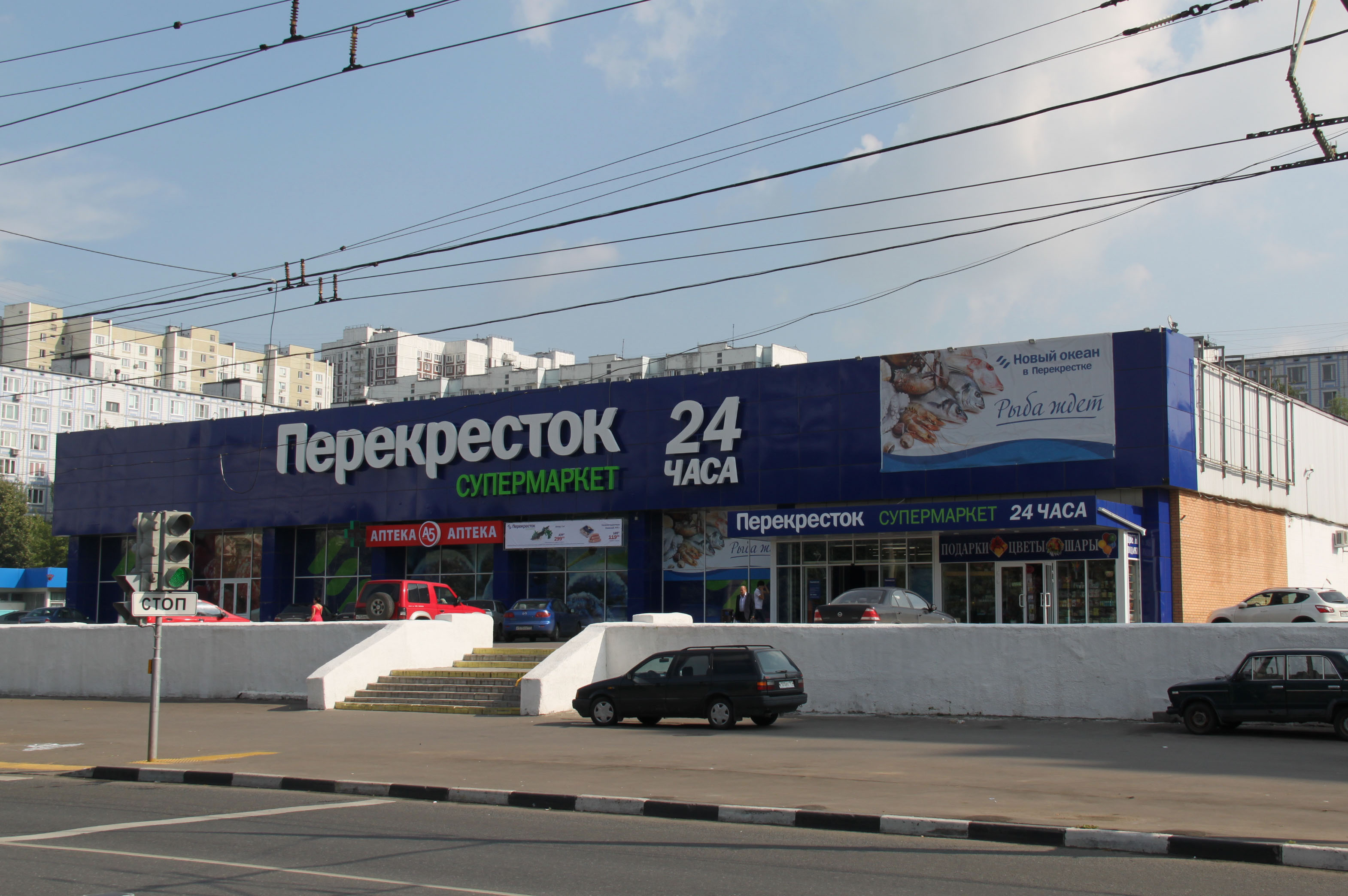 Супермаркет Перекрёсток на Шипиловской улице